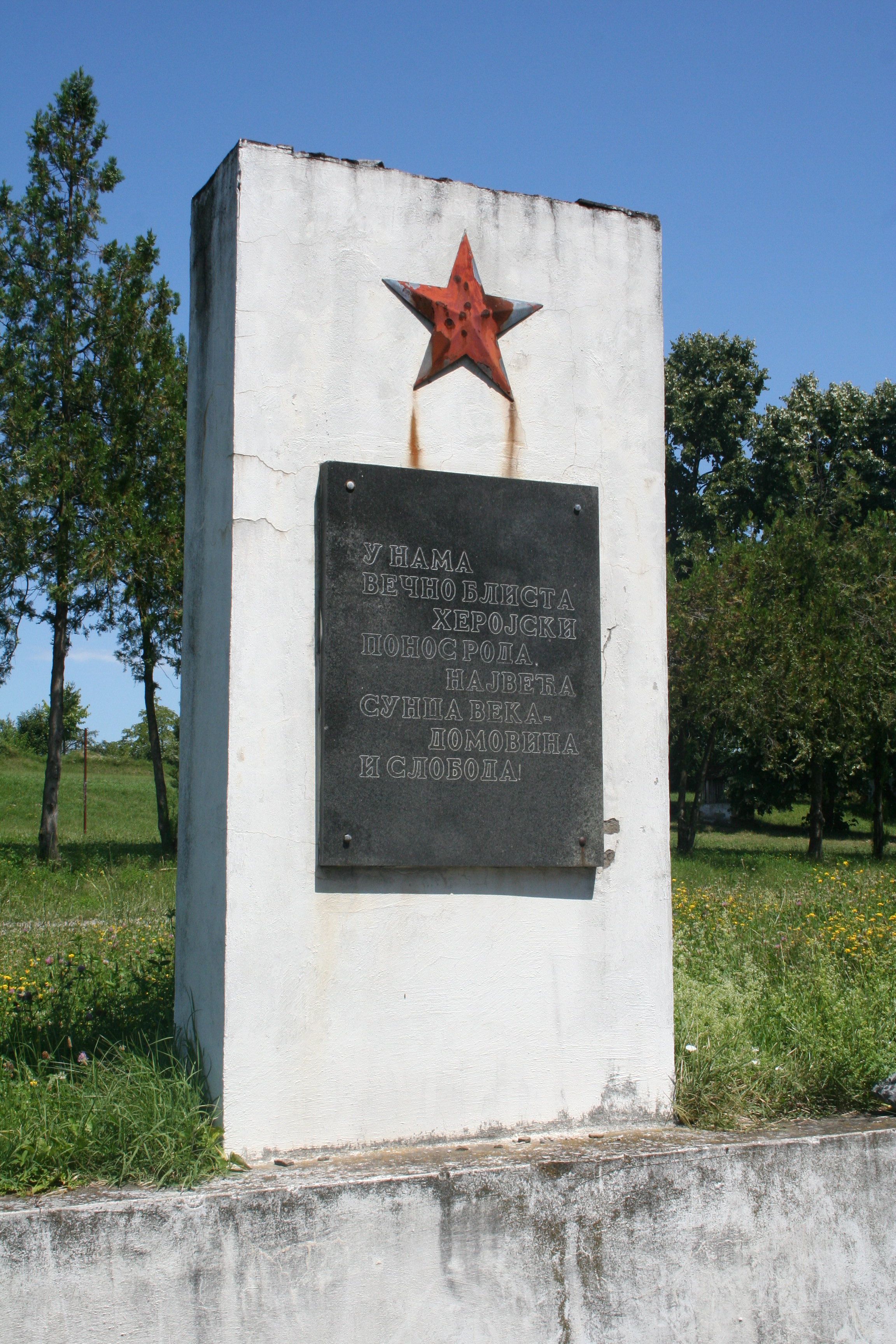 Spomenik NOB-a, Veliko Selo